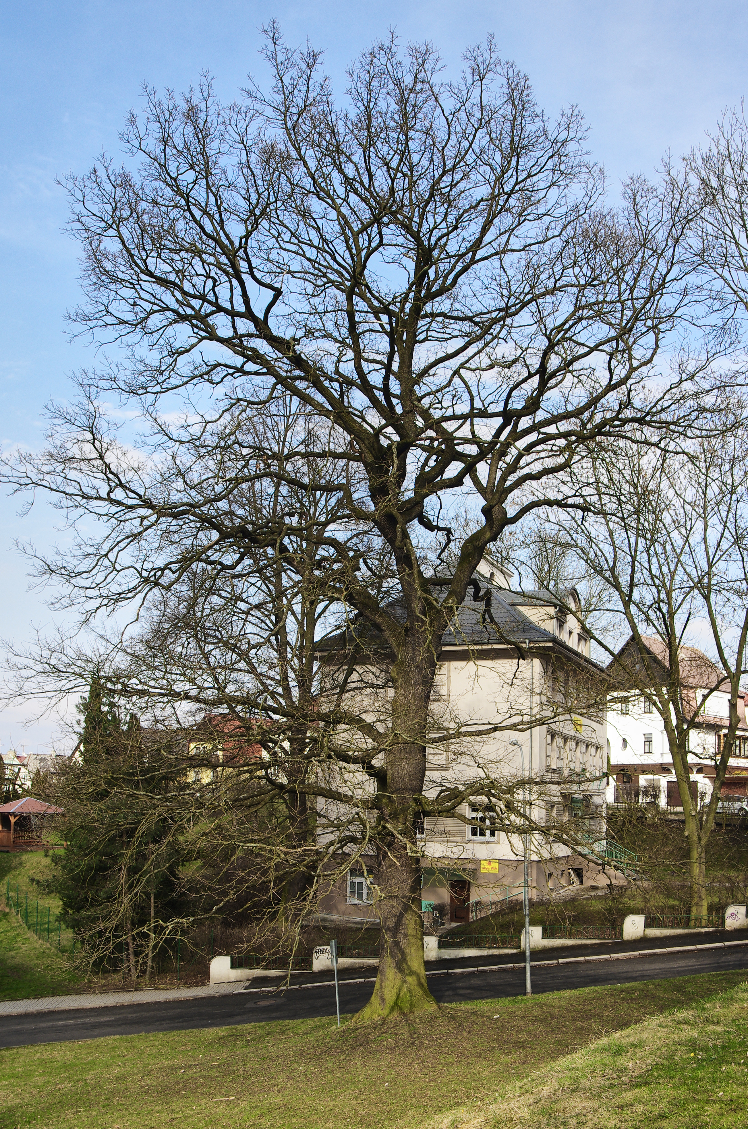 Památný strom - Mozartův dub - Karlovy Vary, místní část Drahovice